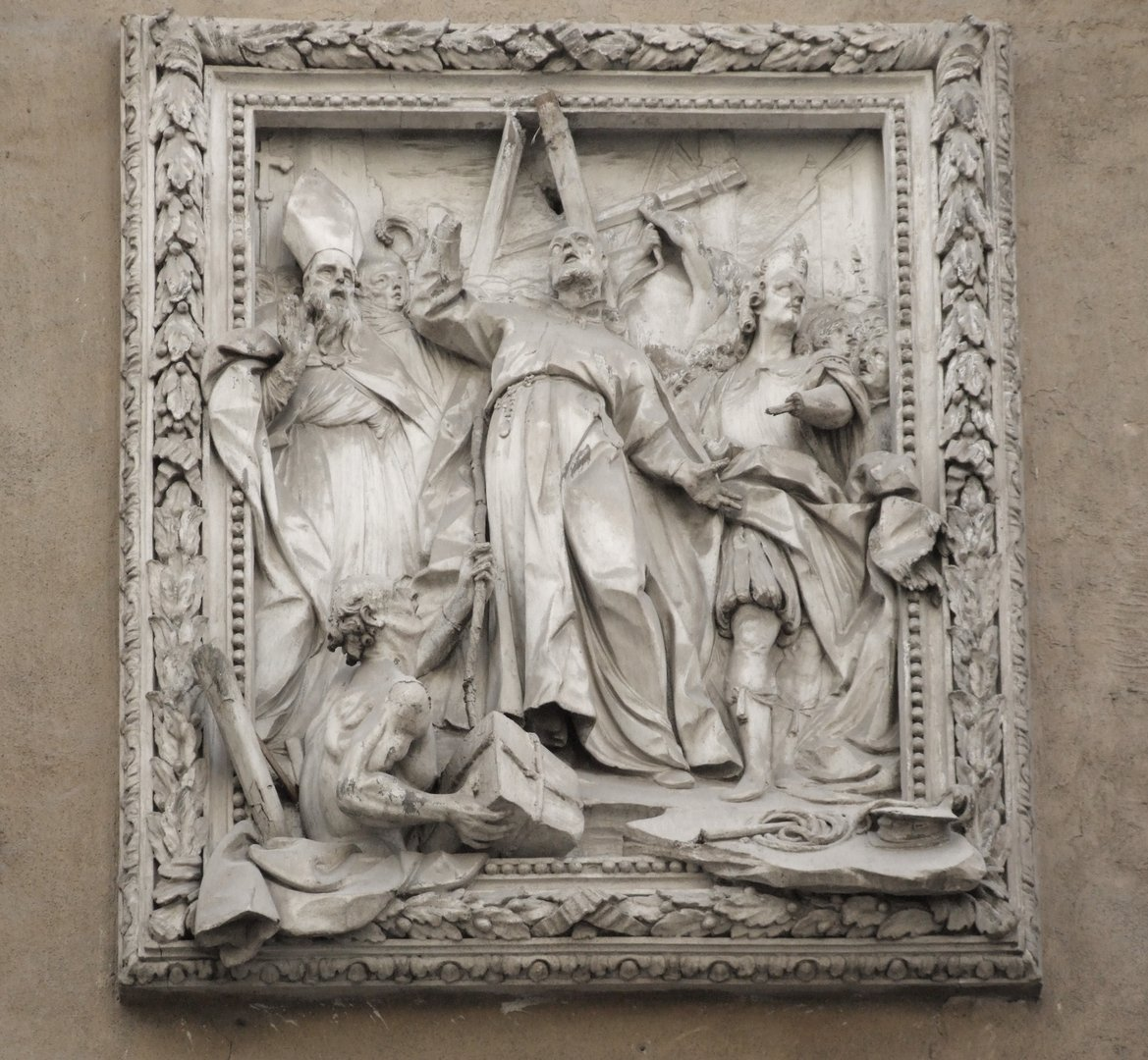 Palermo